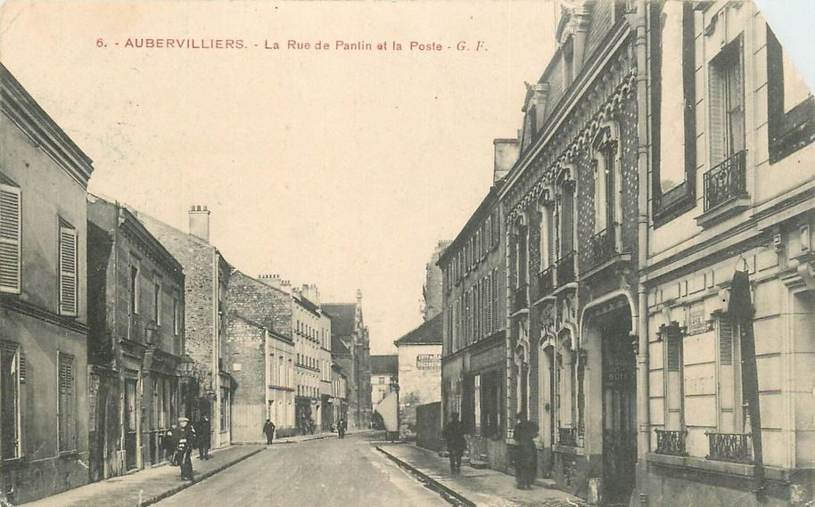 Aubervilliers.Rue de Pantin.Rue Bernard et Mazoyer.La poste